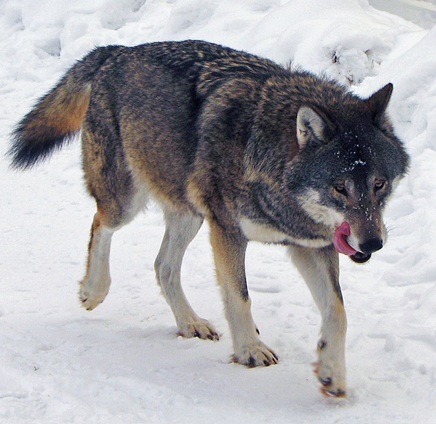 Lobo en el zoo de Kolmården (Suecia).